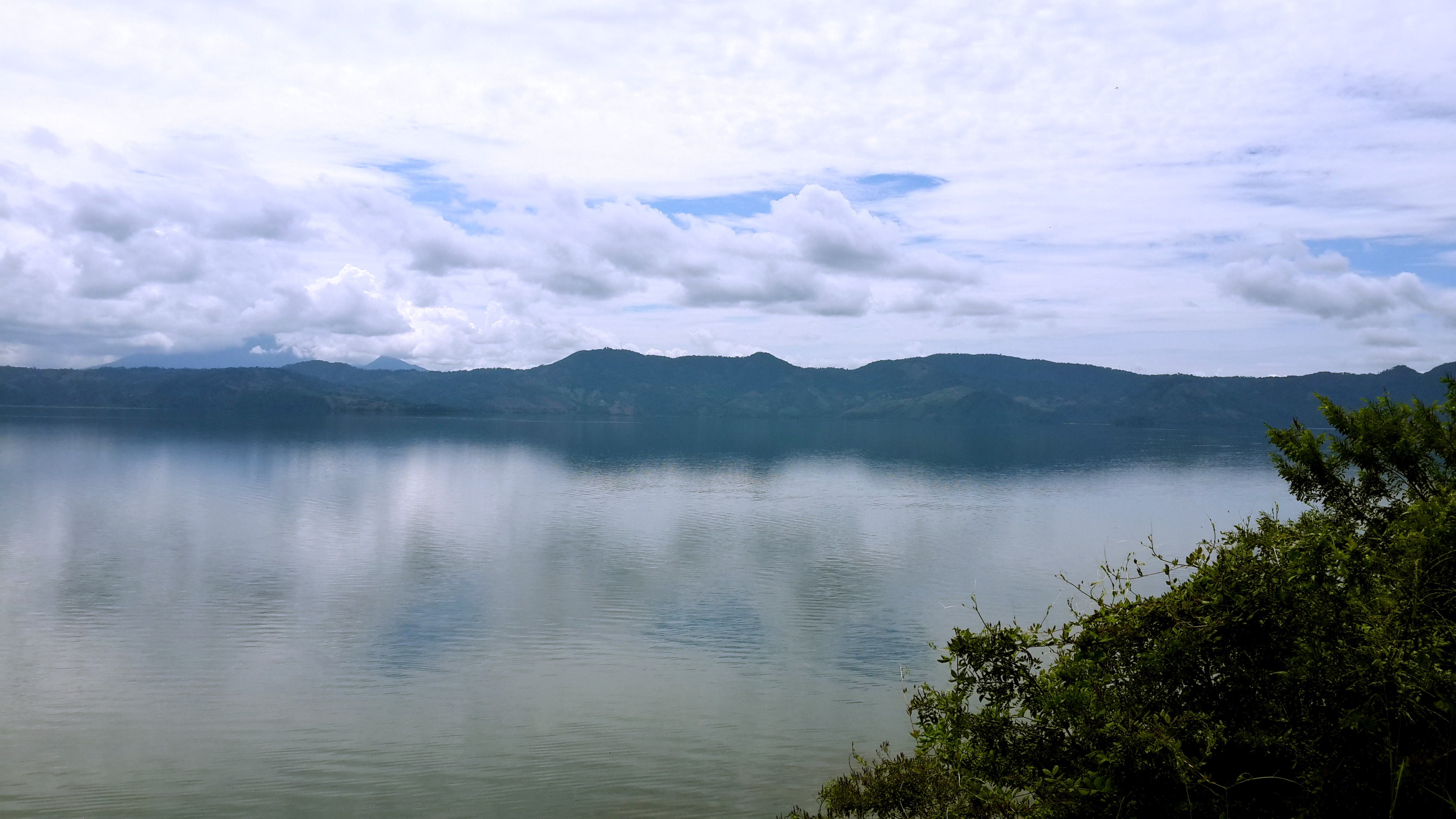 El Salvador - San Martin, Lake Ilopango